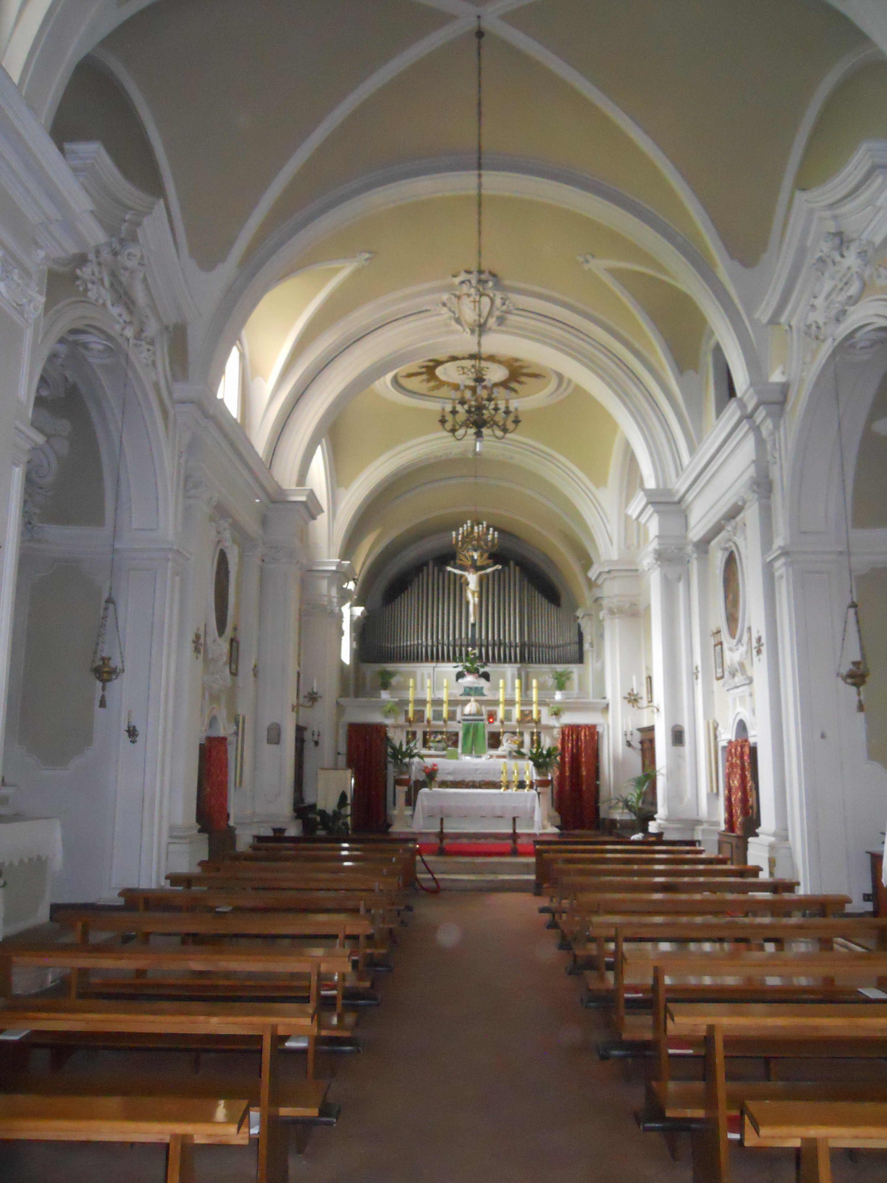 Interno barocco della chiesa di San Bernardino a Sinalunga.